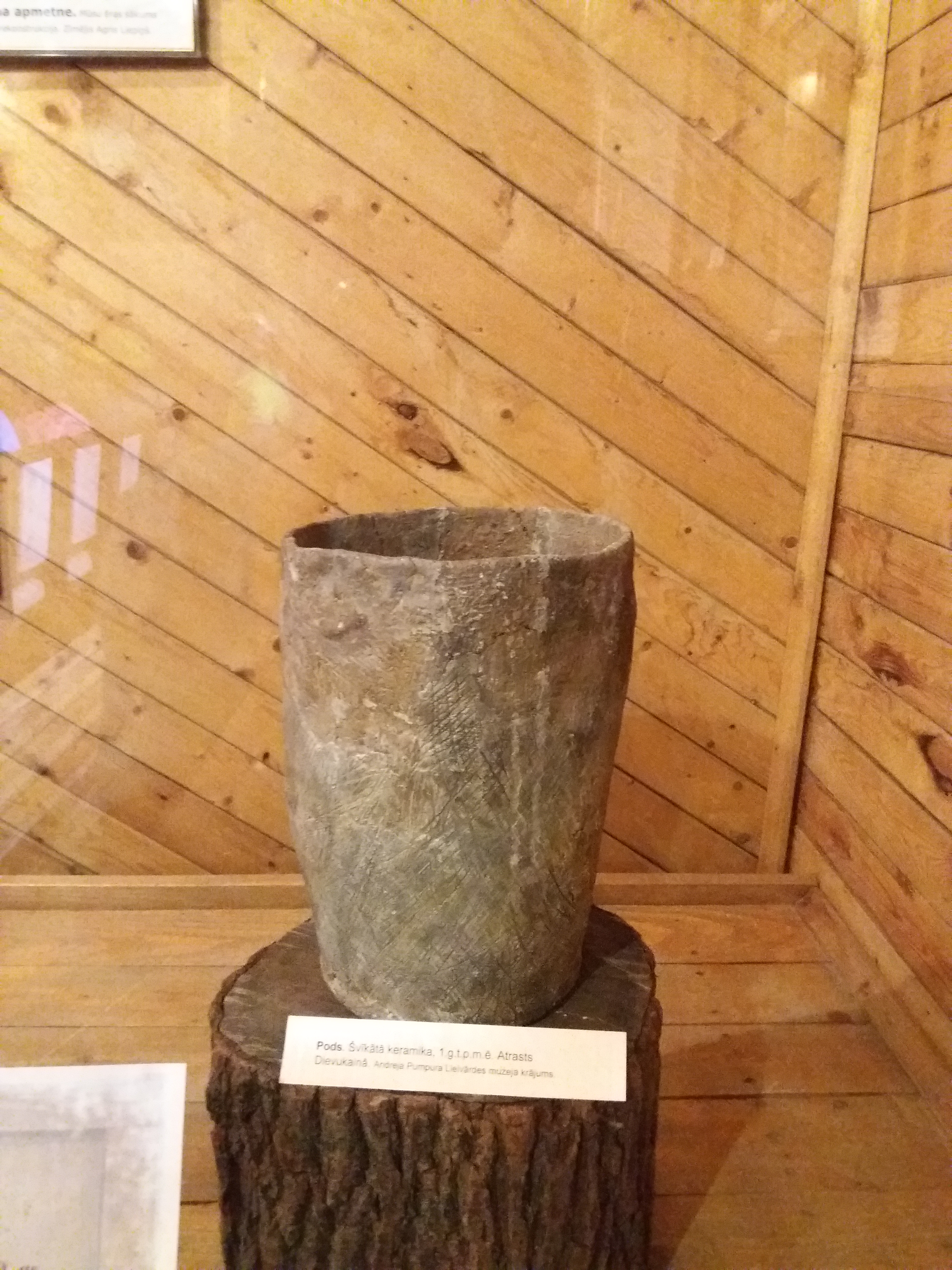 Pods. Švīkātā keramika, 1 g.t. p.m.ē. Dievukalns, Lielvarde